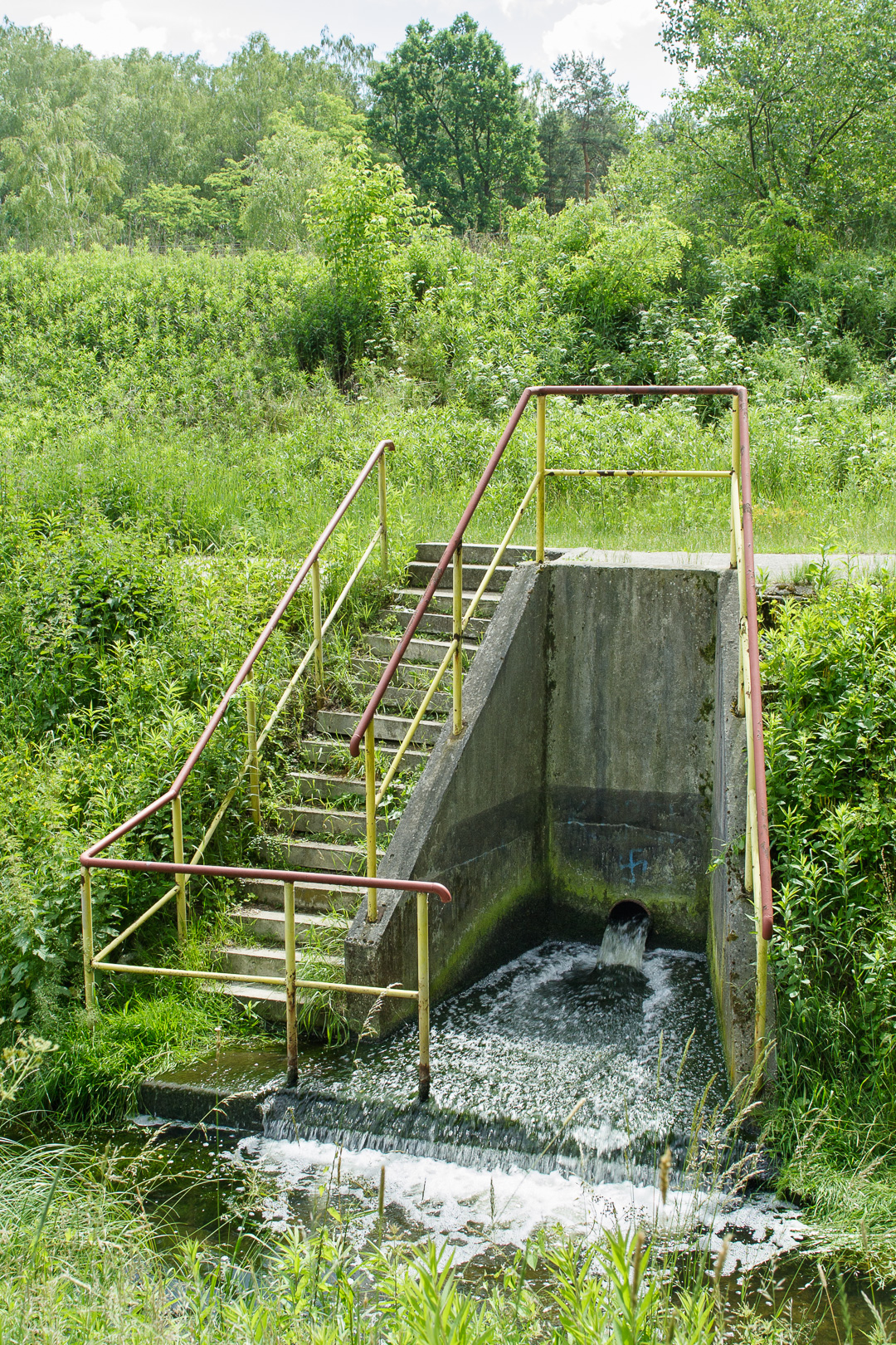 Spust wody oczyszczalni ścieków „Cyraneczka” do Kanału Wawerskiego. Stara Miłosna, Wesoła, Warszawa.